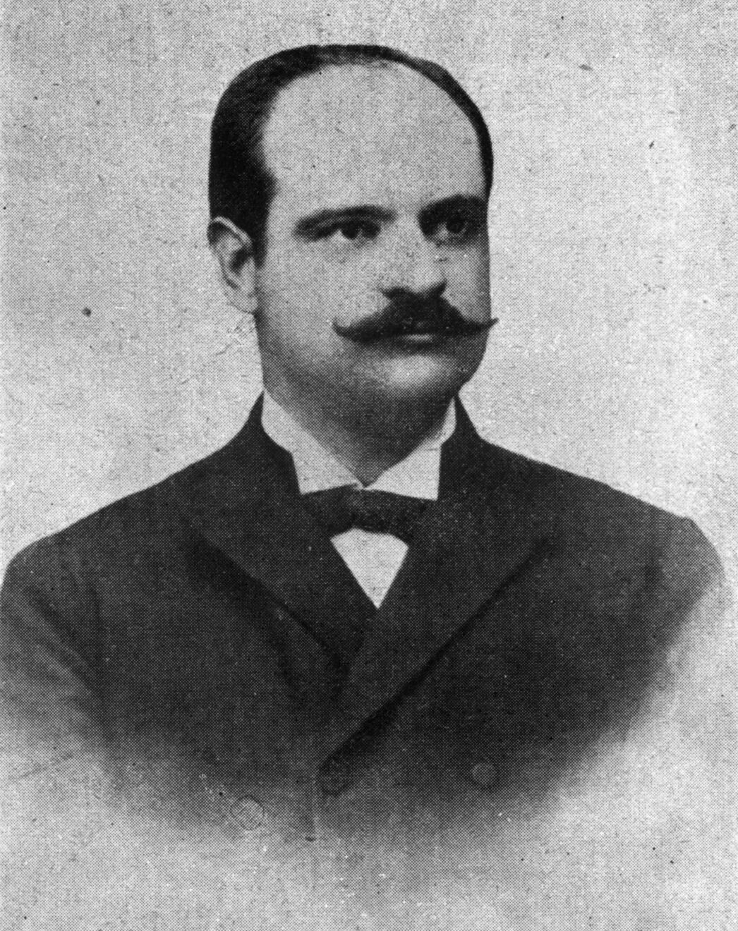 Ivan Garvanoff (*1869,†1907)